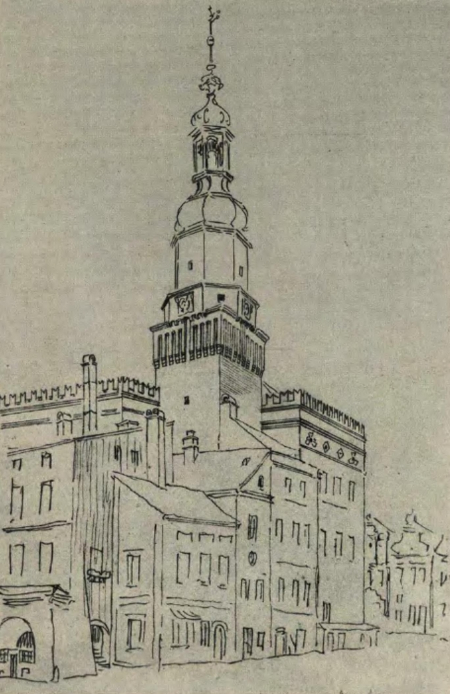 Das Oppelner Rathaus um 1846. Zeichnung von Ferdinand von Quast